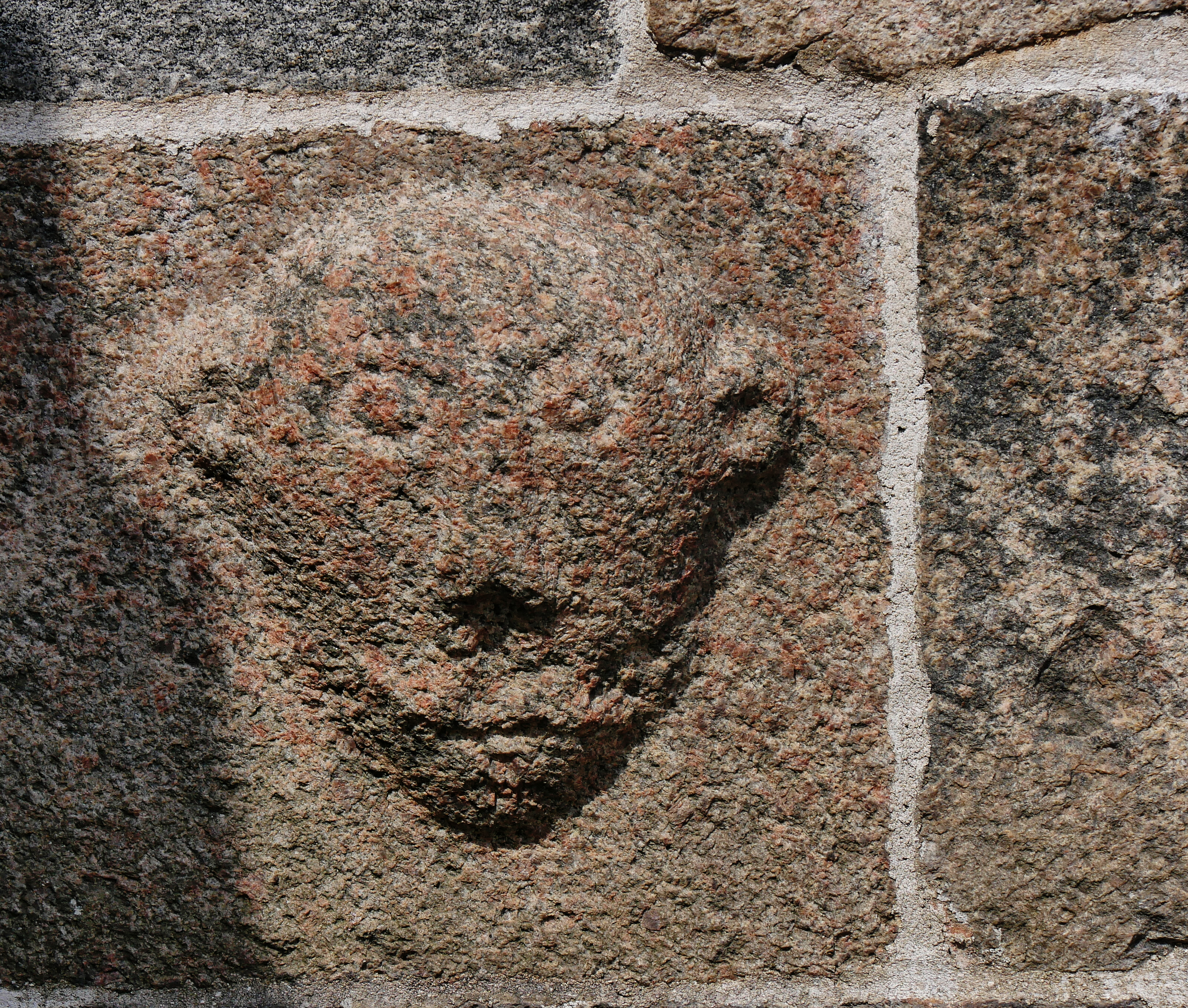 Oue Kirke - Relief eines Löwen an der Südseite der Kirche